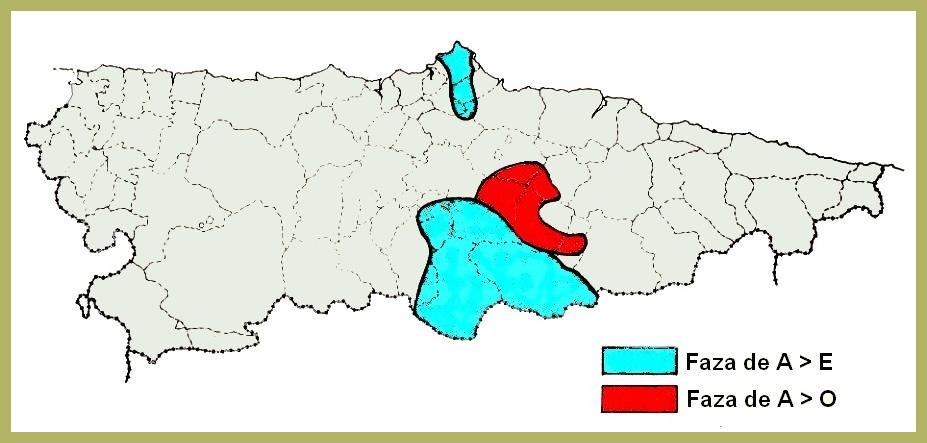 Asturianu. Metafonía ante velar -u